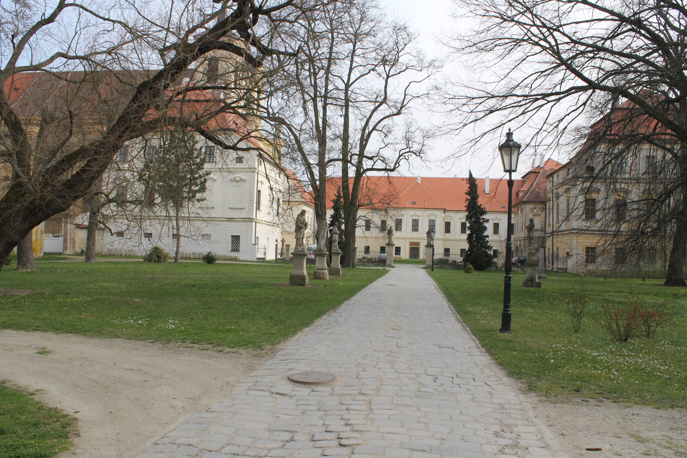 Benediktinský klášter, Rajhrad